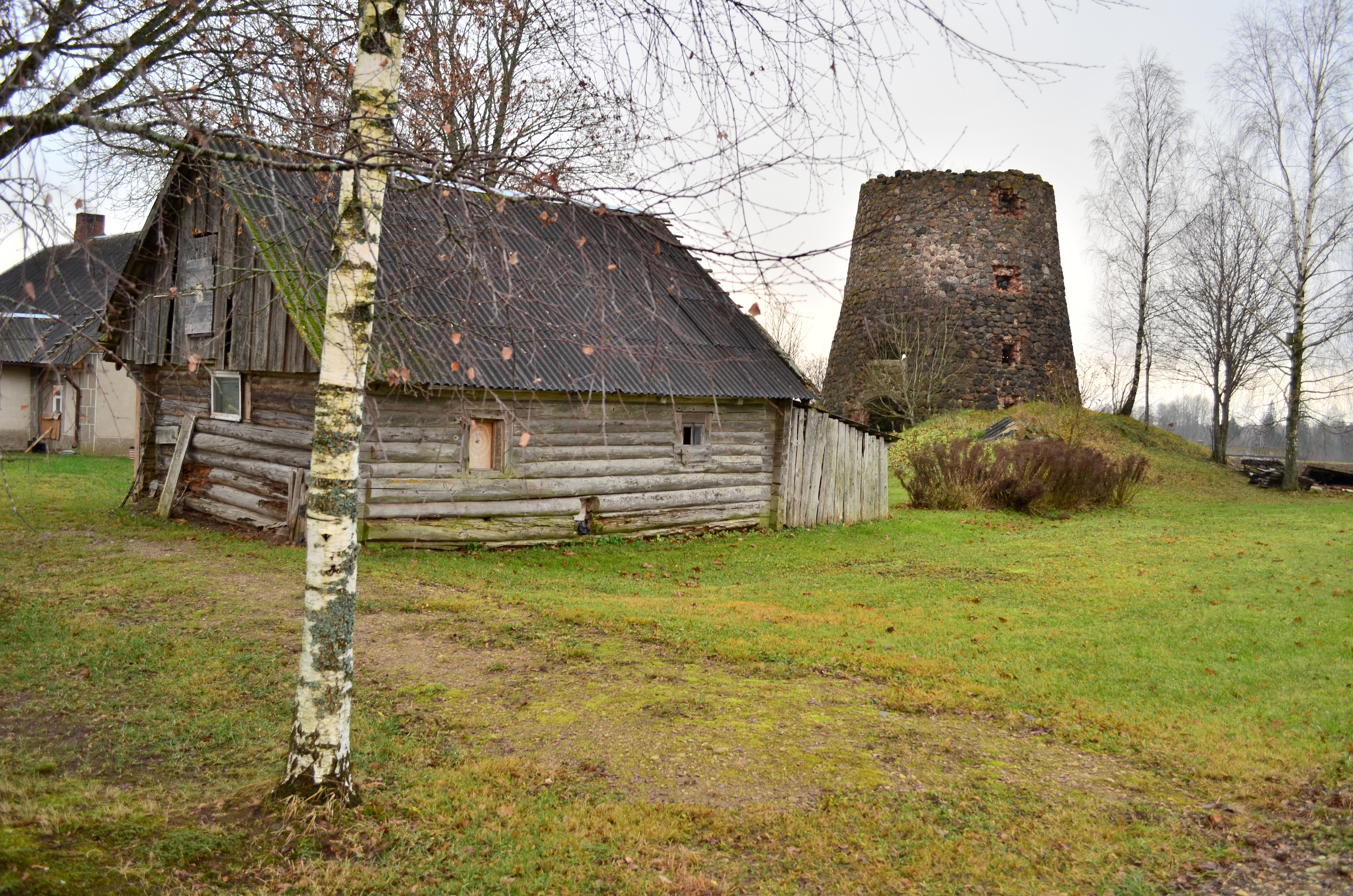 Bērzaines vējdzirnavas / windmill